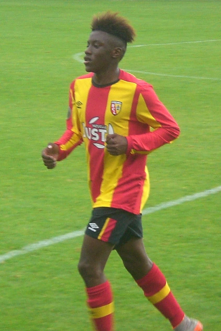 Jean Bellegarde lors du match RC Lens B / AC Amiens, comptant pour la cinquième journée du Championnat de France de football amateur (CFA), le 12 septembre 2015, au Stade François Blin d'Avion.